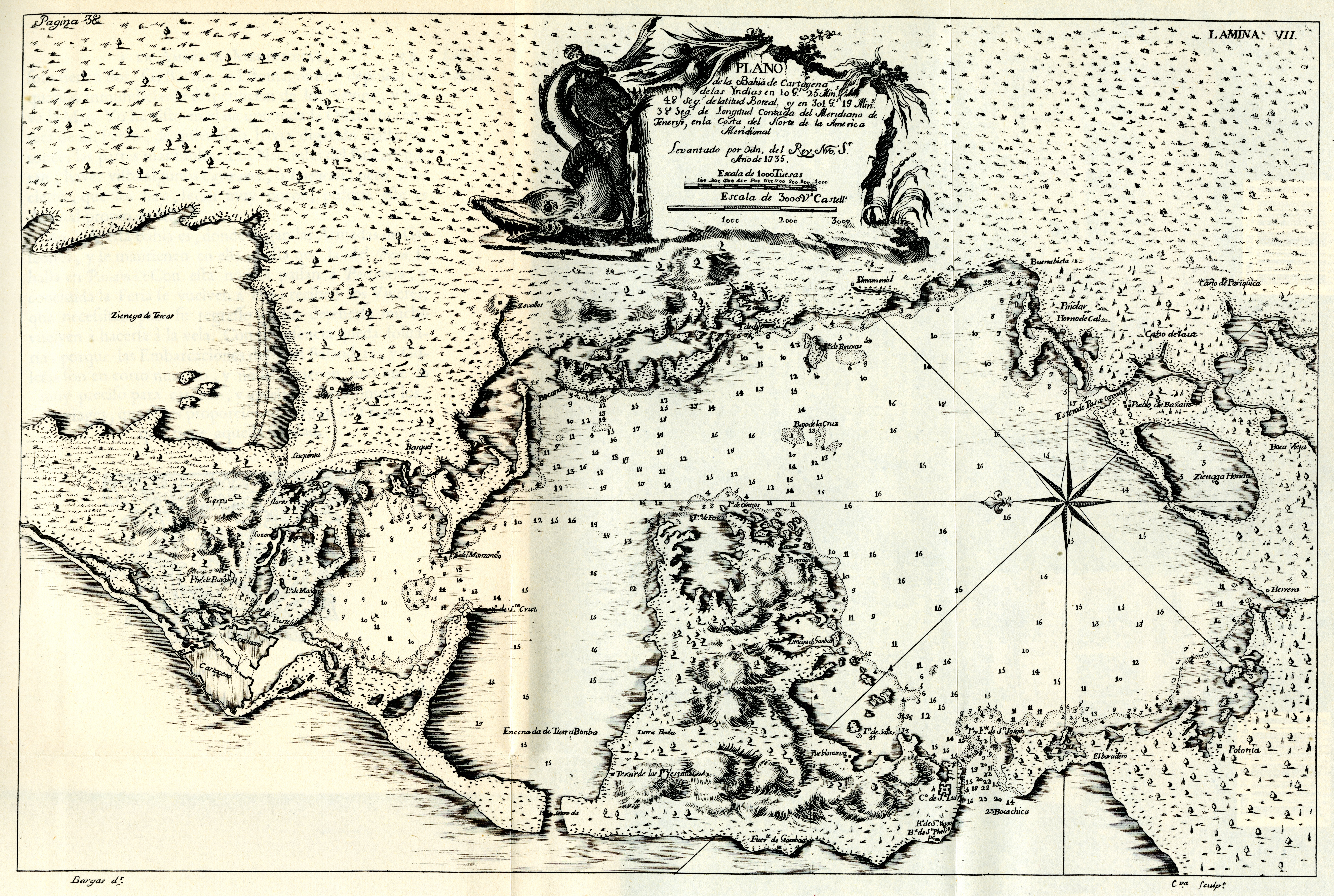 De Ulloa, Antonio y Jorge Juan. Relación Histórica del Viaje a la América Meridional, hecho de Orden de Su Majestad Católica para medir algunos Grados de Meridiano Terrestre, y venir por ellos en conocimiento de la verdadera Figura y Magnitud de la Tierra, con otras varias Observaciones Astronómicas y Físicas. Por Don Jorge Juan Comendador de Aliaga, en la Orden de San Juan, Socio correspondiente de la Real Academia de las Ciencias de París; y Don Antonio de Ulloa de la Real Sociedad de Londres: ambos por Capitanes de Fragata de la Real Armada. Primera Parte / Tomo I. Impresa por la Orden del Rey Nuestro Señor en Madrid por Antonio Marín, Año de MCDDXLVIII (1748). Diapositiva de Consulta y acceso publico cuya información fue investigada de un libro y/o ejemplar de revisión custodiado en los Fondos Bibliográficos (Sección Siglo XVIII o Etapa Colonial) del Archivo Histórico del Guayas; Guayaquil, Ecuador